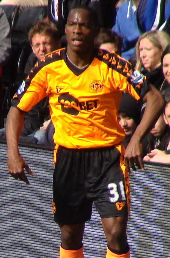 Maynor Figueroa; Fulham V Wigan